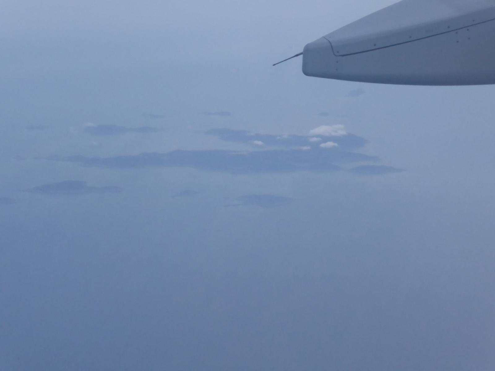 桃園空港から温州空港着の機上から撮影した南ジ島全景